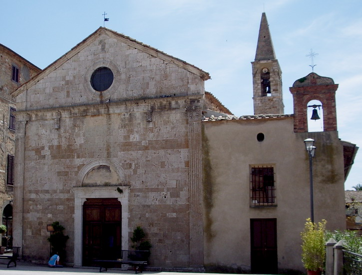 Facciata Chiesa di San Giovanni Battista Magliano in Toscana